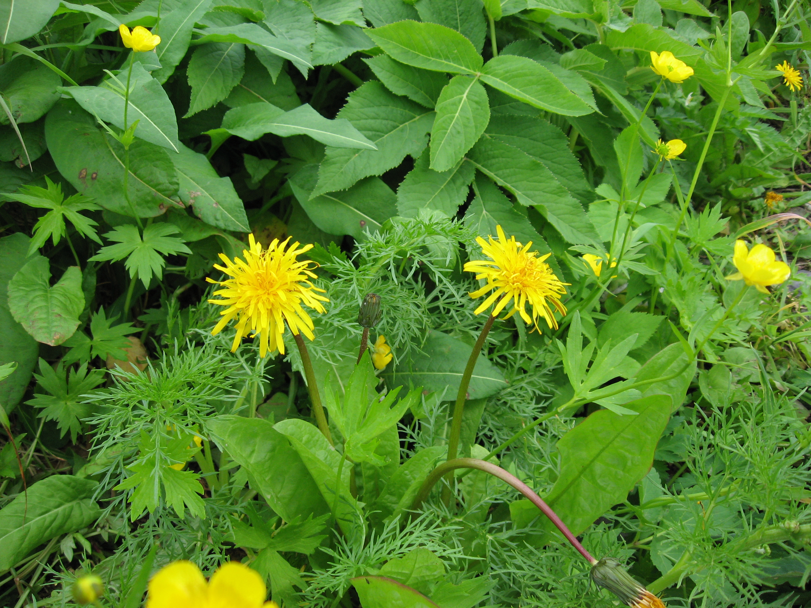 ヤツガタケタンポポ (学名：Taraxacum yatsugatakense)